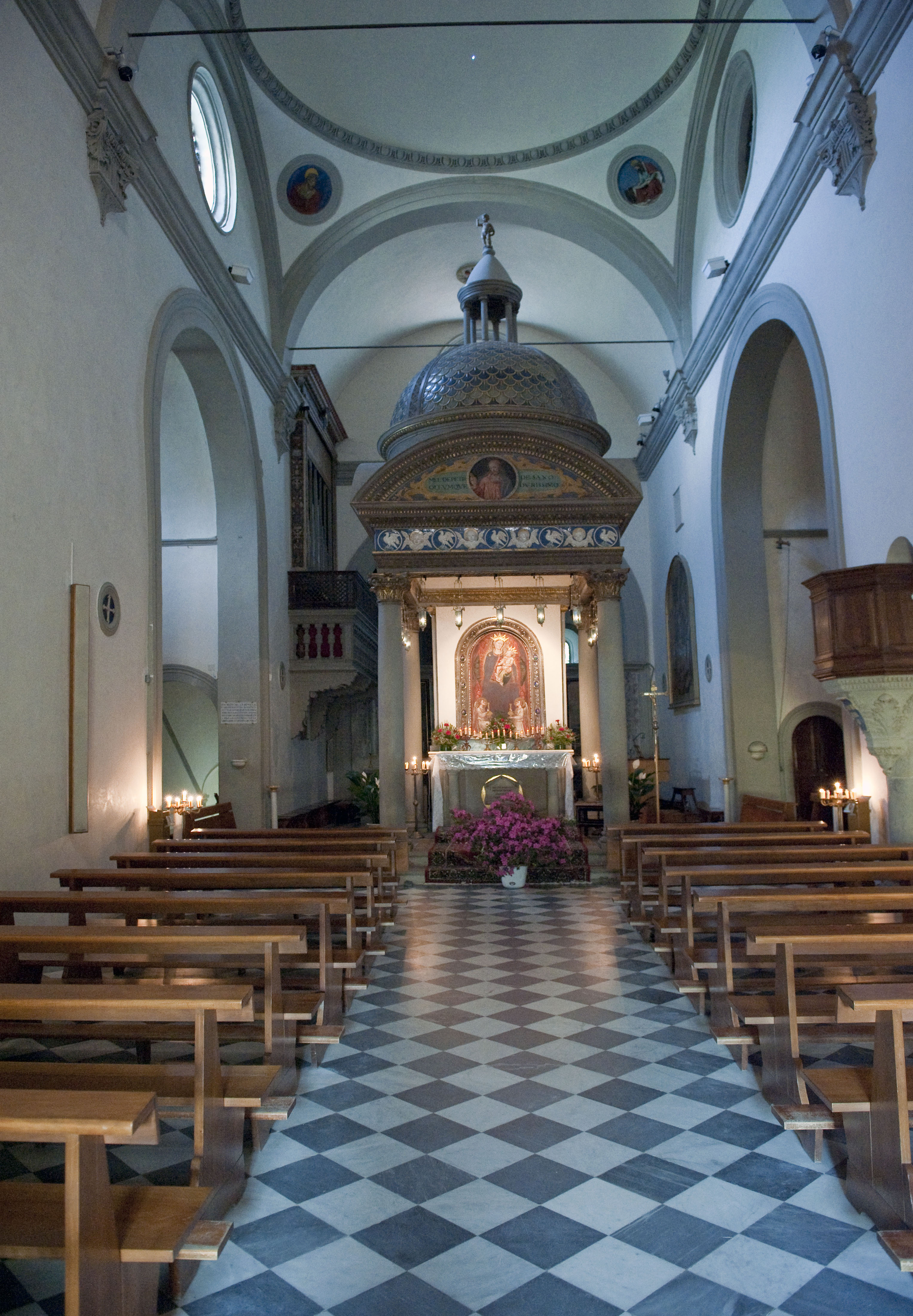 Interno del Santuario di Santa Maria del Sasso - Bibbiena